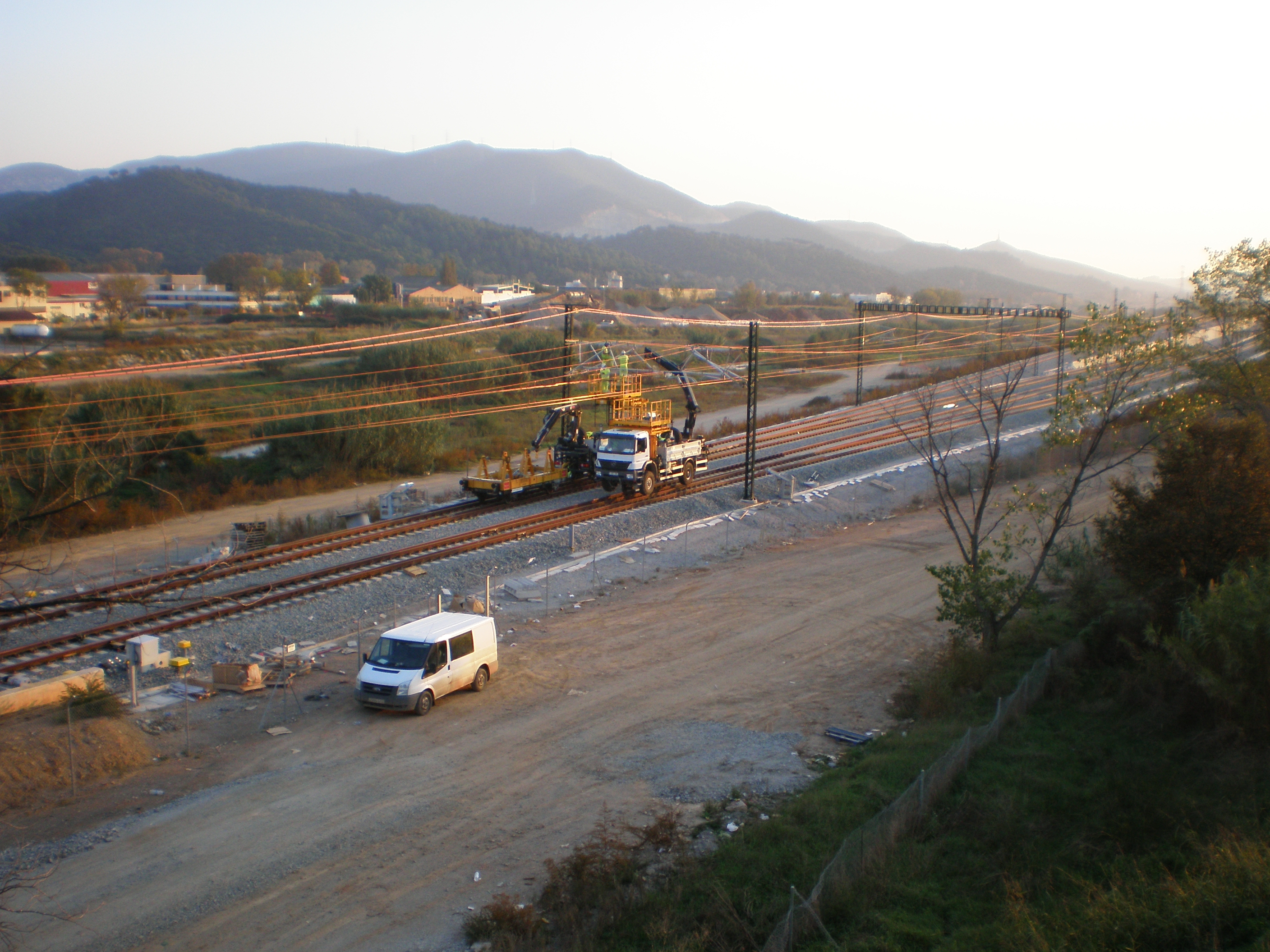 Vehículos biviales en la construcción de la LAV mixta Barcelona-Figueres en Mollet del Vallès (Vallès Oriental).